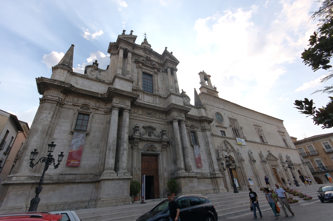 Sulmona 2011